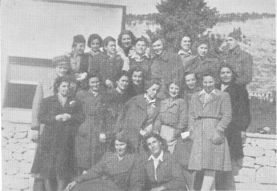 Srpskohrvatski / српскохрватски: Tečaj za upravitelje dječjih domova u Splitu veljače 1945. g. U sredini: Tatjana Marinić, upravitelj tečaja.